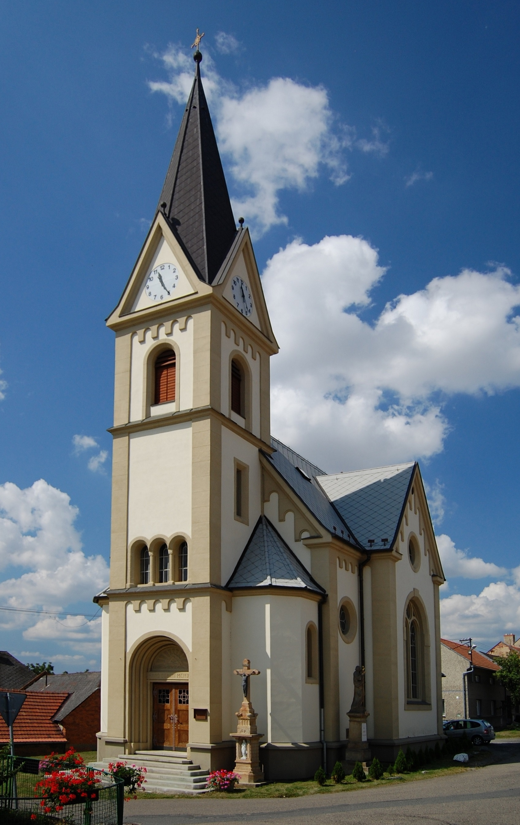 Kostel Držovice